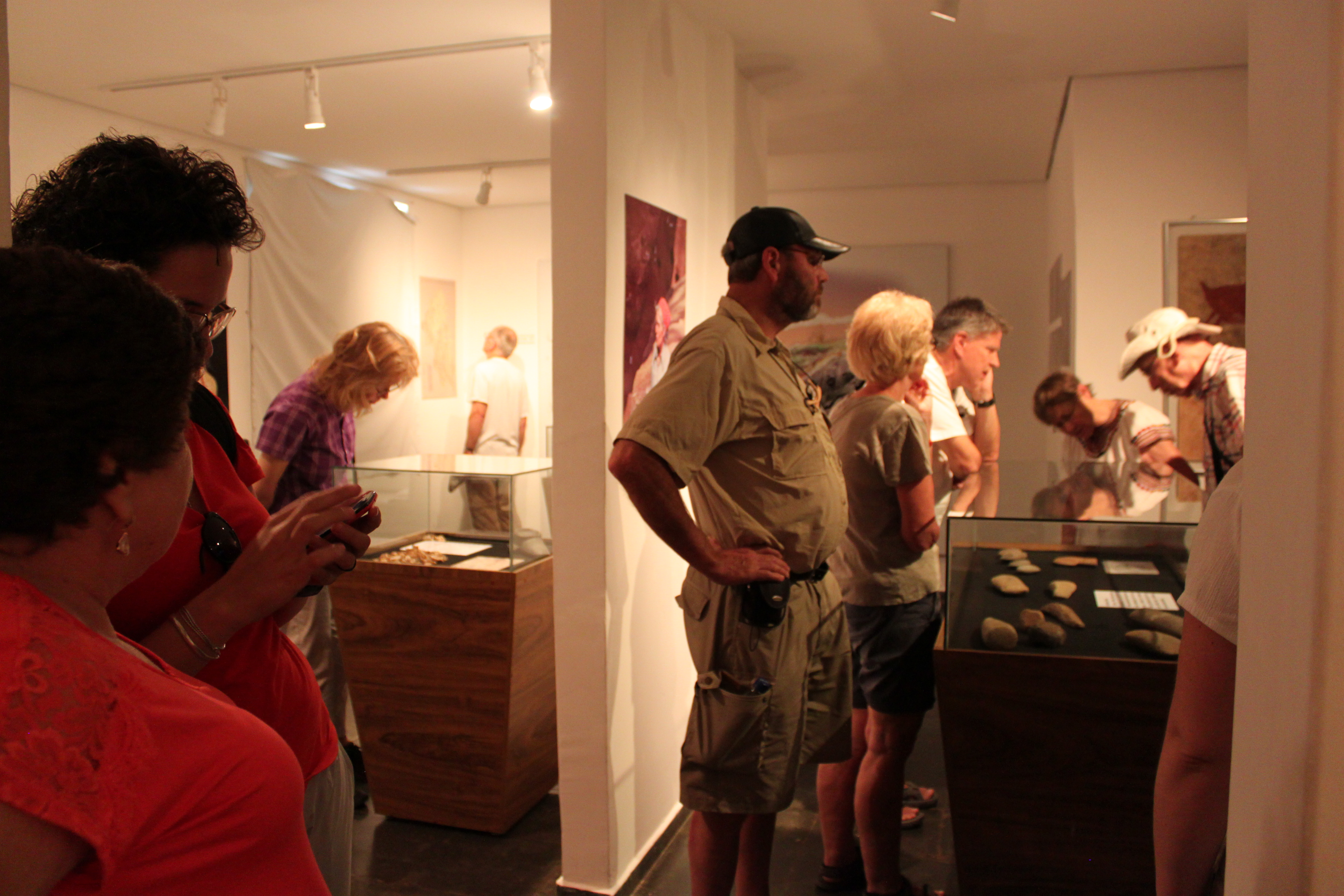 Exposição do Centro de Arqueologia Annette Laming Emperaire em Lagoa Santa (foto de Cleito Ribeiro)